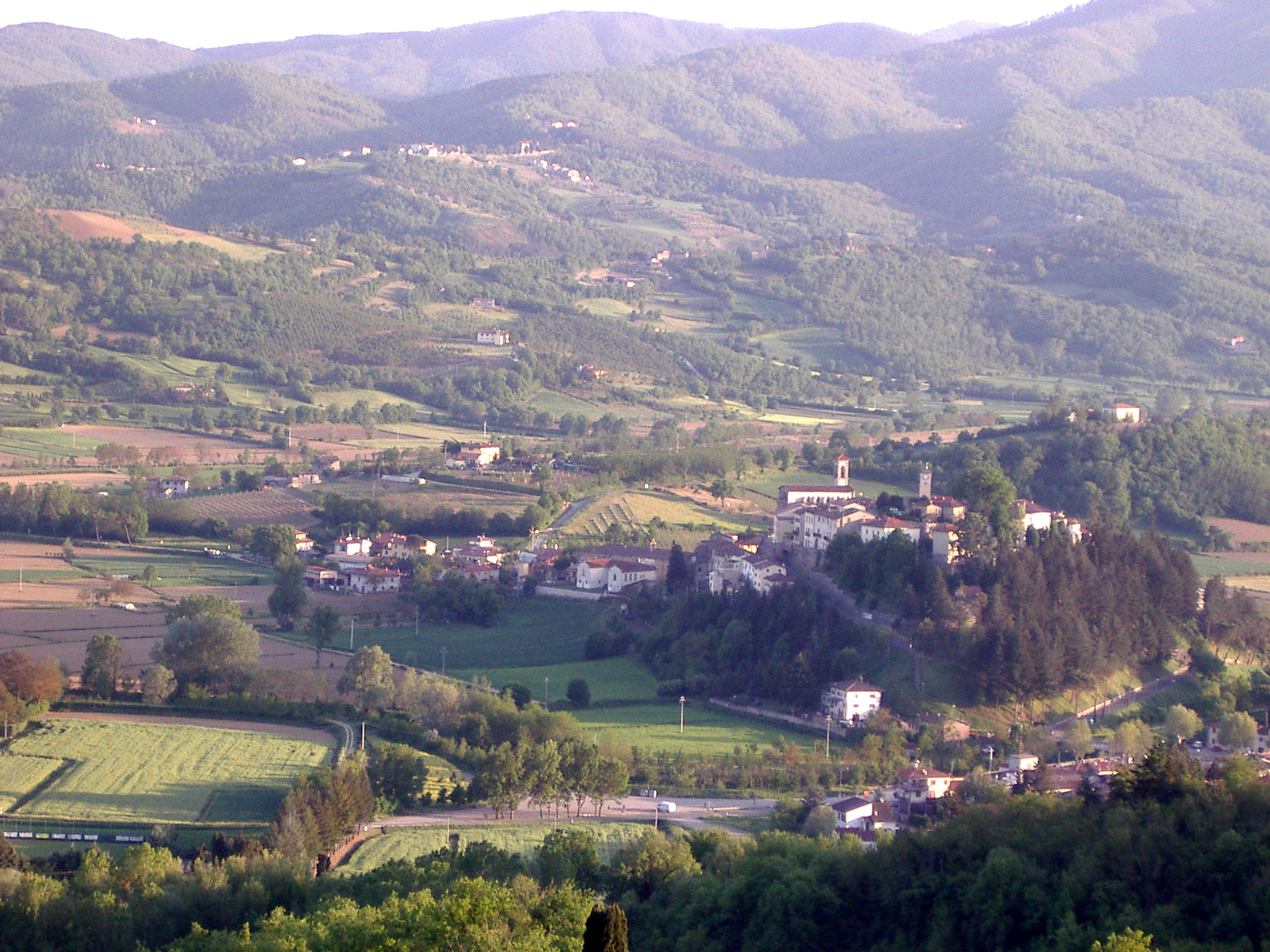 Vue de Monterchi en Toscane